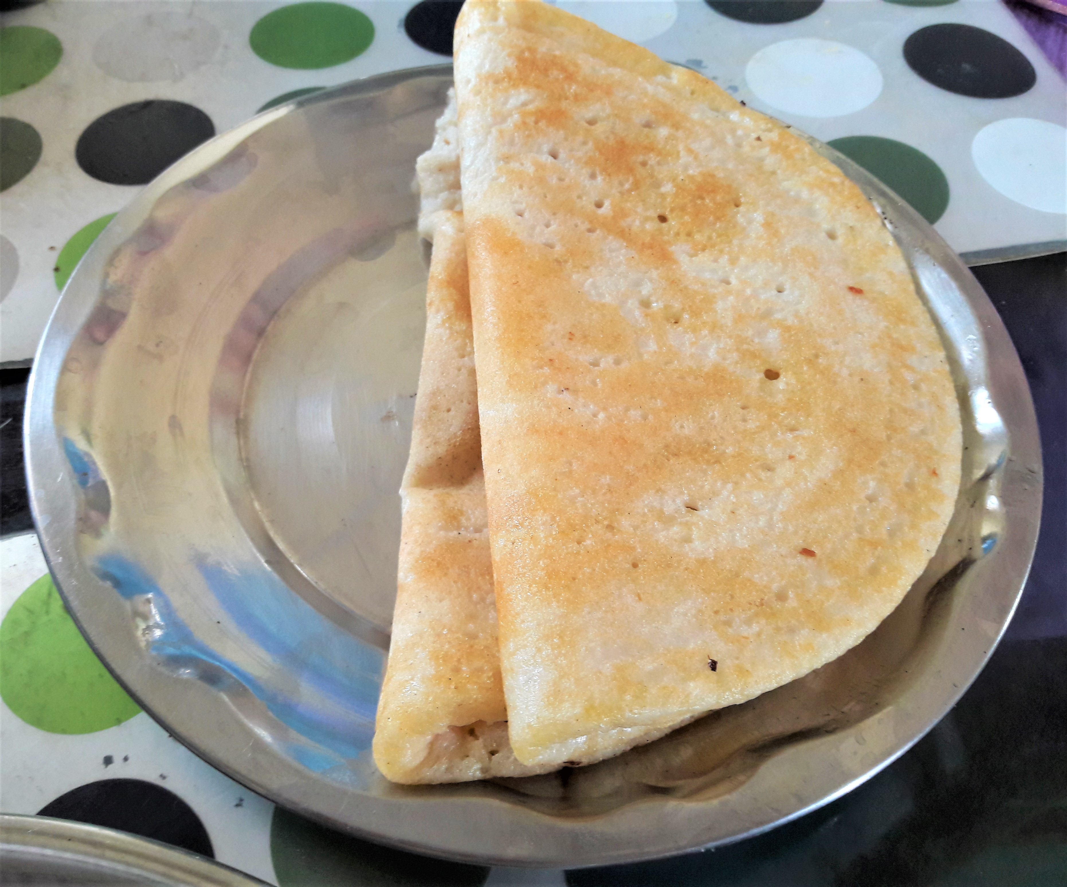 మినప అట్లు